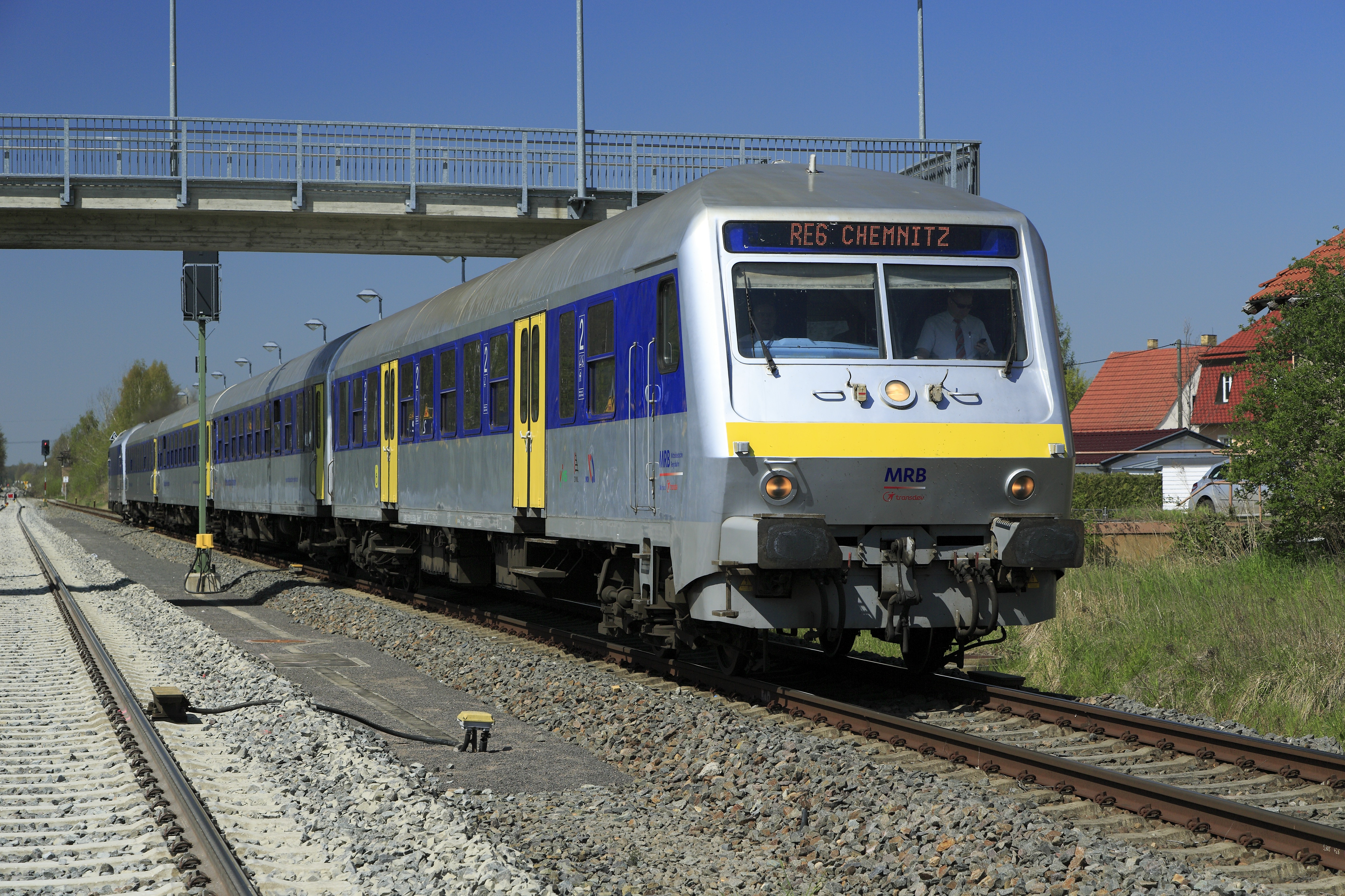 Bei der Abfahrt Richtung Chemnitz Hbf. Nur wegen des Schienenersatzverkehrs Richtung Leipzig wenden auch die Eilzüge auf dem Randgleis, wegen der knappen Bahnsteiglänge hier in Belgershain verkehren sie während der Bauzeit um einem Wagen verkürzt.